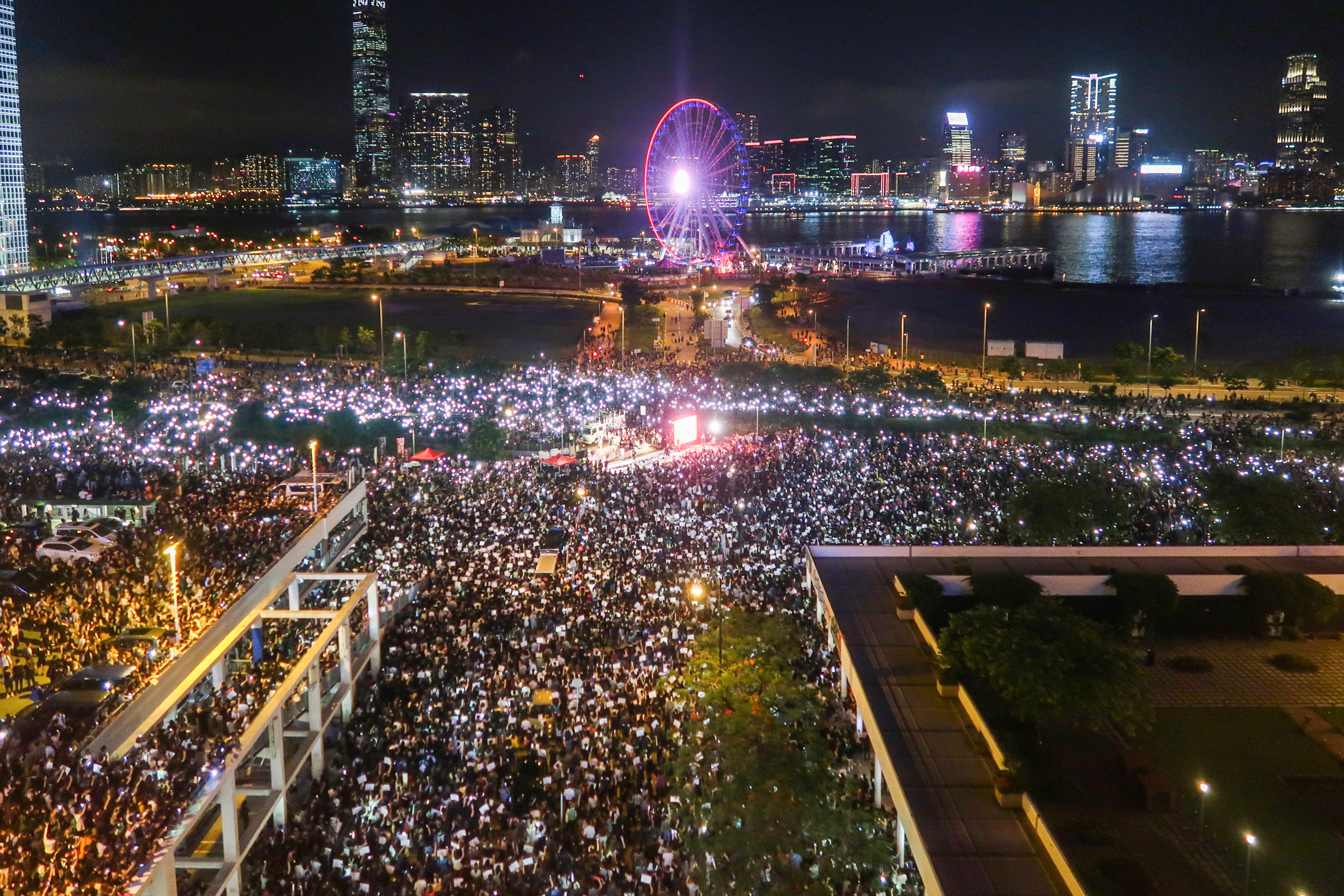 G20 Free Hong Kong protest overview